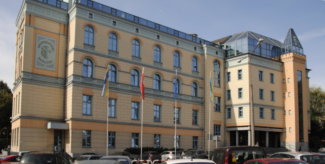 Collegium Maius der Universität Oppeln